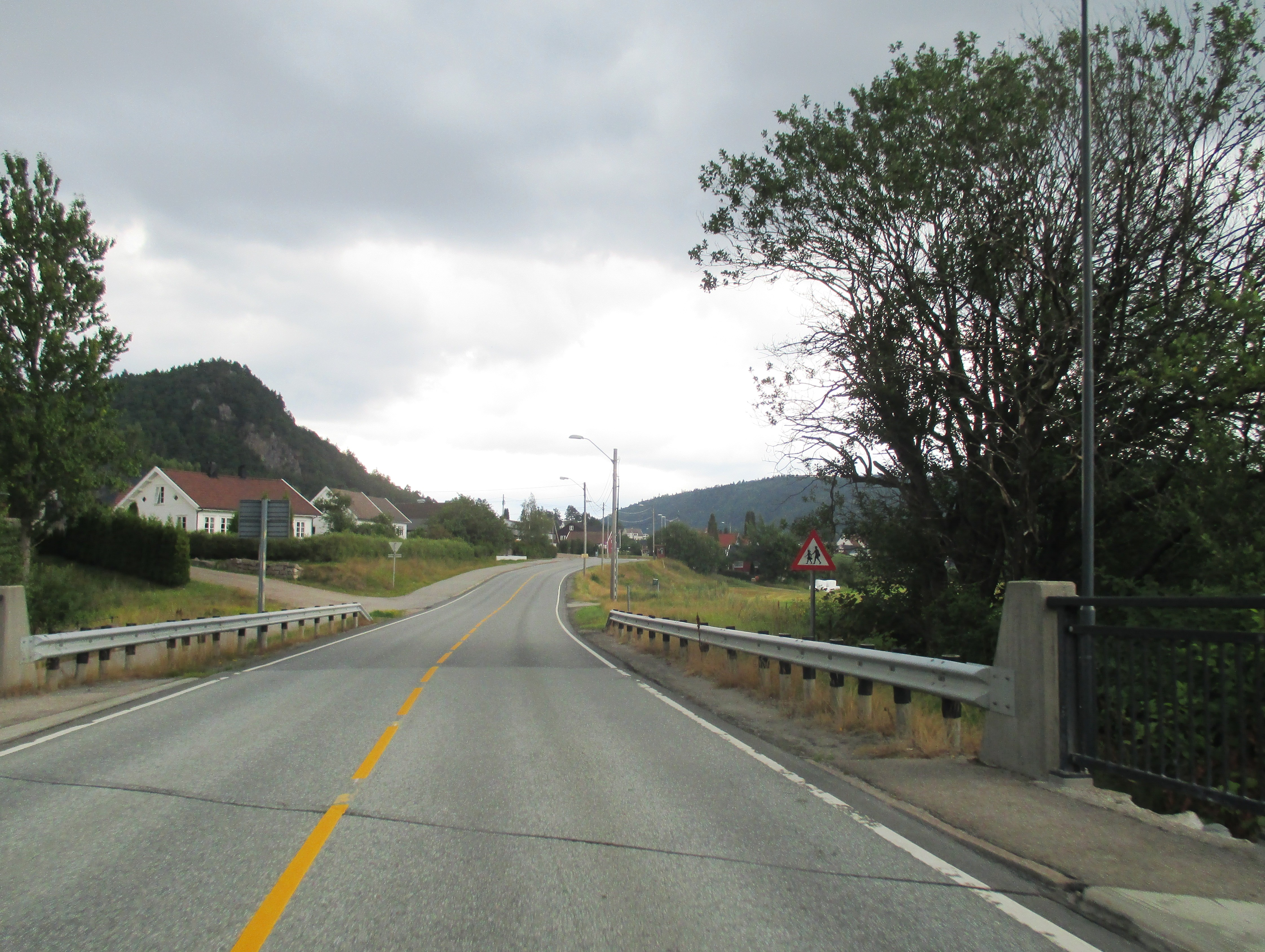 Bro over sideløp til Otra ved Mosby